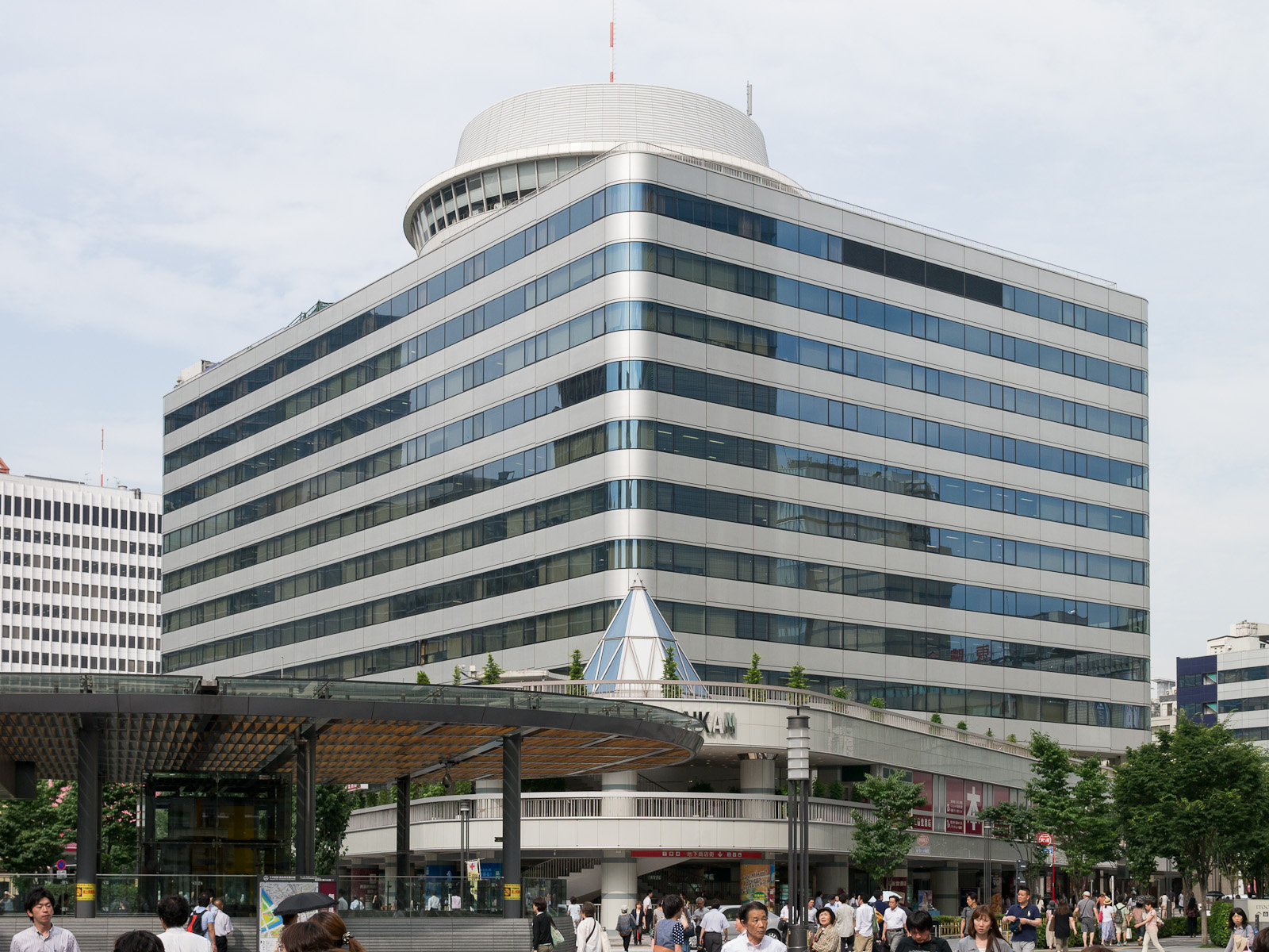 有楽町駅前の「東京交通会館」。